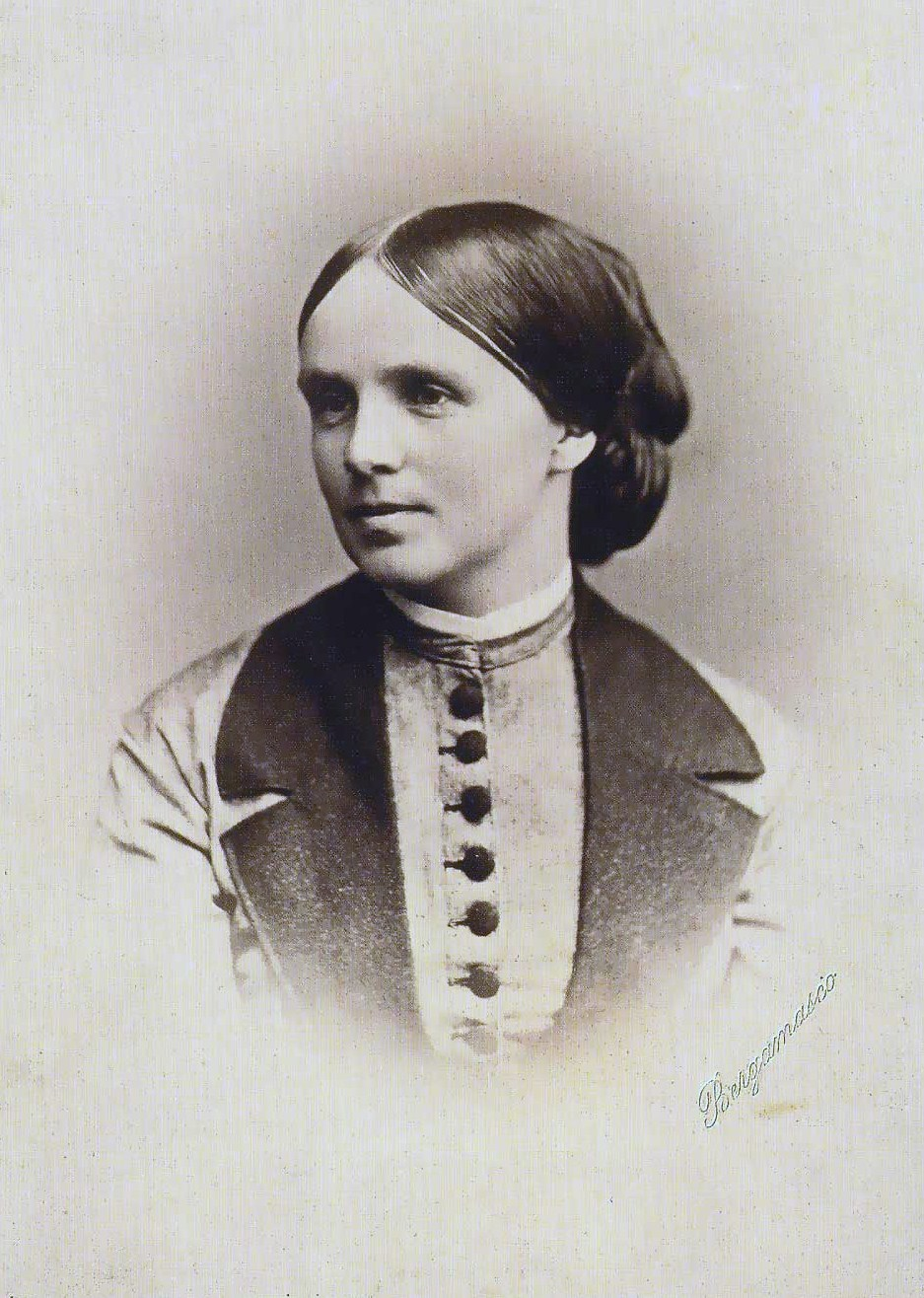 Прасковья Сергеевна Уварова, ур. Щербатова (1840-1924)